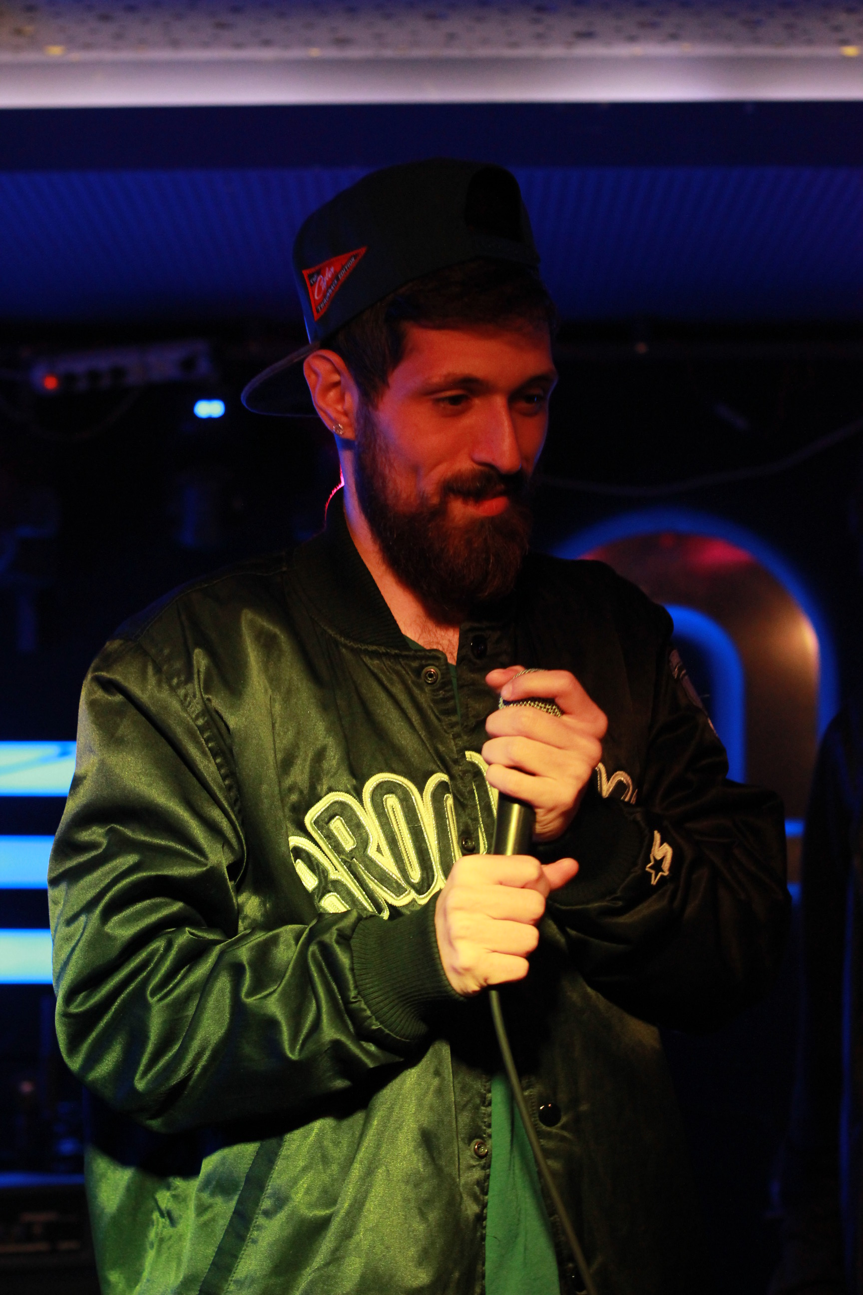 Keişan, Elçin Orçun konserinde.